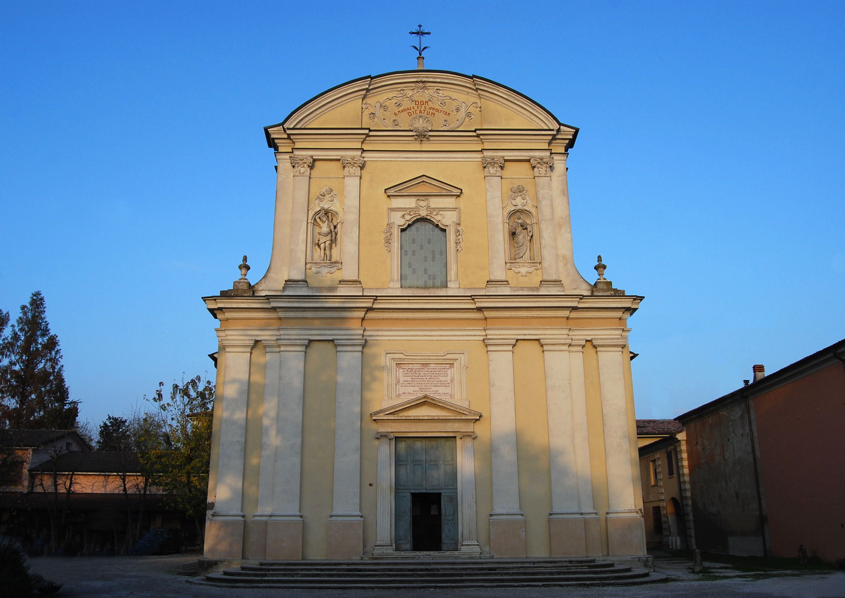 Gazoldo degli Ippoliti, chiesa parrocchiale.